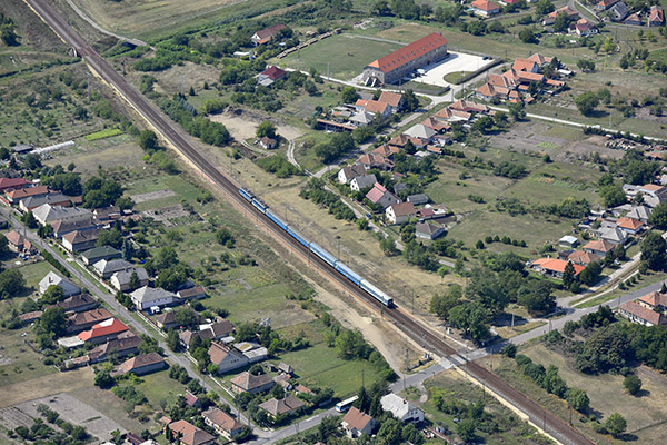 Szihalom látképe madártávlatból